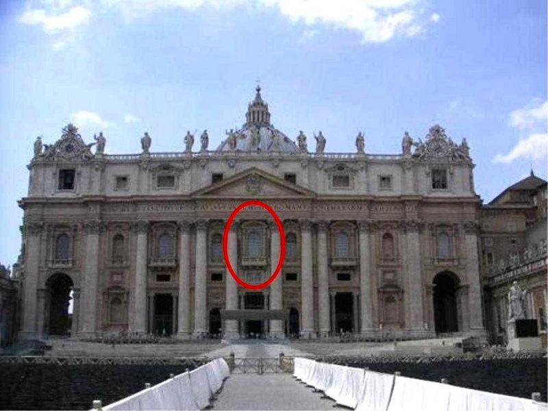 Fassade des Petersdom mit Hinweis auf die Benediktionsloggia